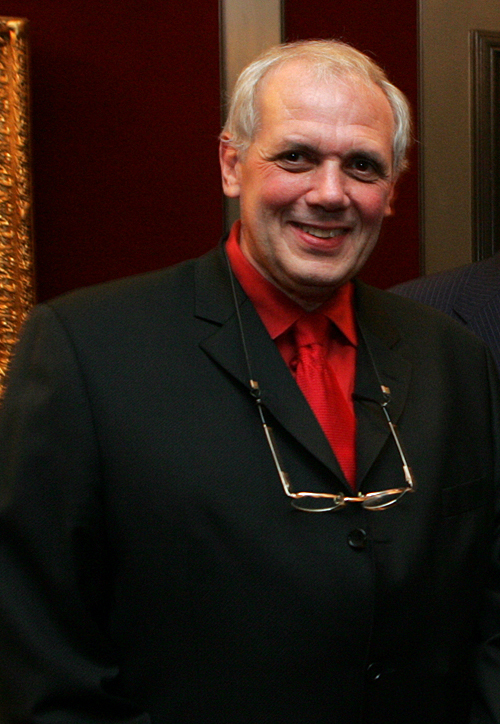 Dick Bakker (Blaricum, 23 mei 1947) is een Nederlandse Componist, Arrangeur, Dirigent, Geluidstechnicus en Muziekproducer.